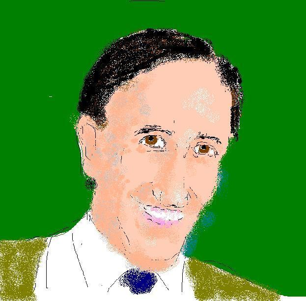 Moved from Image:!!!Ivan Illich.JPG. Originally uploaded by: 7 aug 2006 13:32 . . Chiossone . . 623×612 (60.051 bytes) (Ich schuf dieses Porträt basierend auf die Informationen, die irgendein Vertrauen verdienen.)